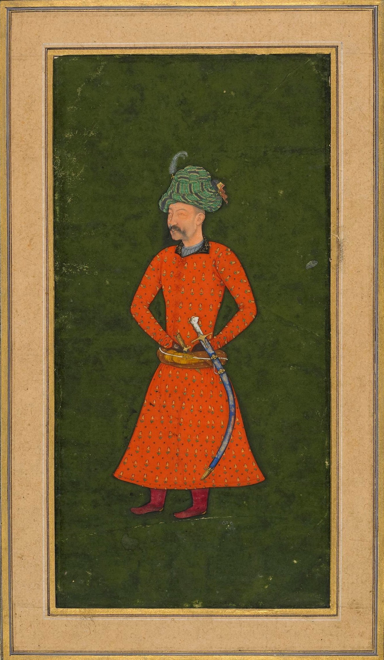 این اثر هنری بخاطر به این دلیل که اولین انتشارش قبل از ۱ ژانویهٔ ۱۹۲۳ روی داده است هم‌اکنون در سراسر جهان در مالکیت عمومی قرار دارد و استفاده از آن آزاد است. بنابراین تکثیر آن در ایالات متحده آمریکا، آلمان و بسیاری کشورهای دیگر آزاد است.